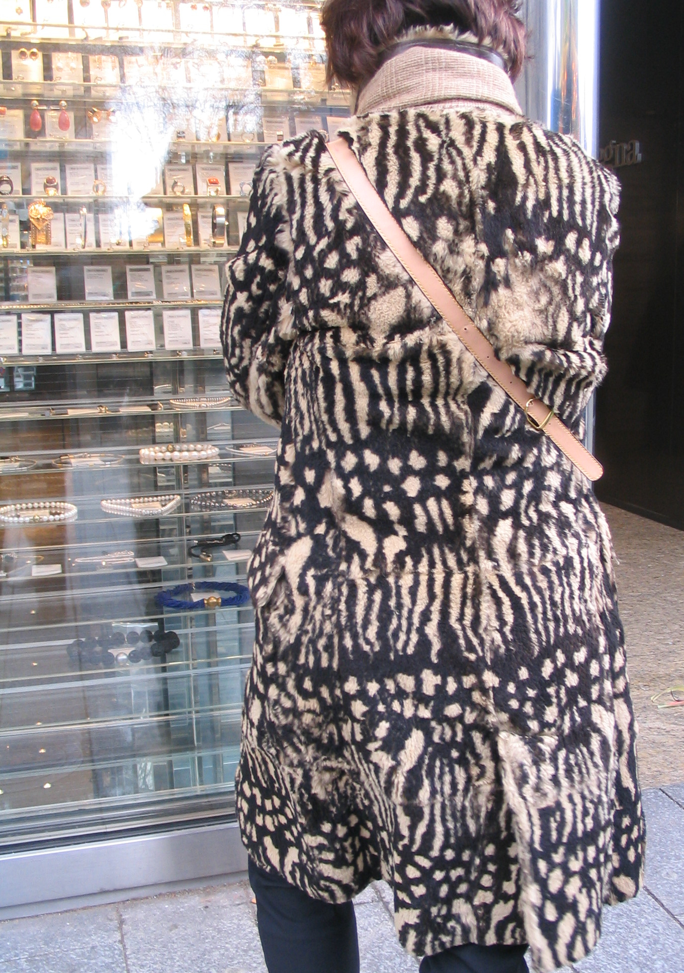 Kaninjacke mit Print. Düsseldorf, Königsallee, vor Second Hand Juwelier, 2012.